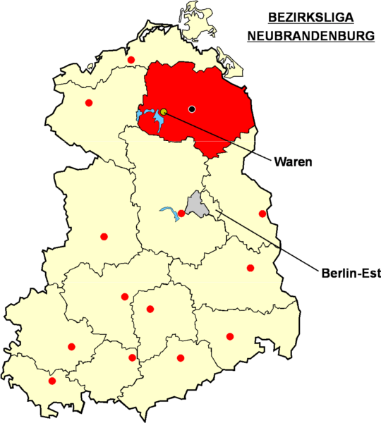 Localisation de Waren dans la "Bezirksliga Neubrandenburg" à l'époque de la RDA Catégorie:Logo de clubs de football - Allemagne